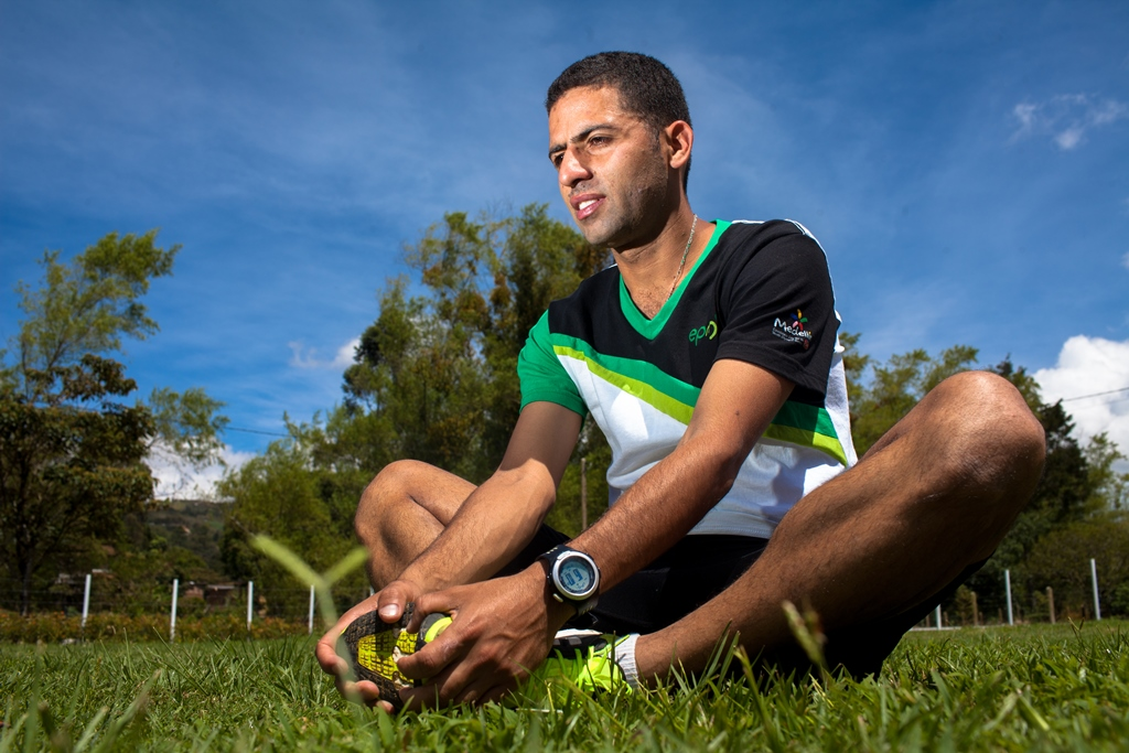 Atleta paraolímpico. Selección Antioquia.